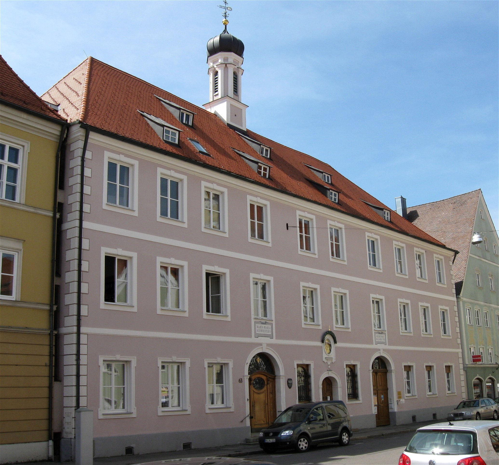 Maximilianstraße 63; Institut der Englischen Fräulein, unregelmäßige Vierflügelanlage, dreigeschossige Walm- bzw. Satteldachbauten mit Kapelle Herz Jesu im Nordflügel, von German Pecher und Valerian Brenner 1715-20, Erweiterung des Südflügels nach Westen 1896/97, Verbreiterung des Ostflügels durch Johann Baptist Nerb 1954; mit Ausstattung. D-7-78-173-102